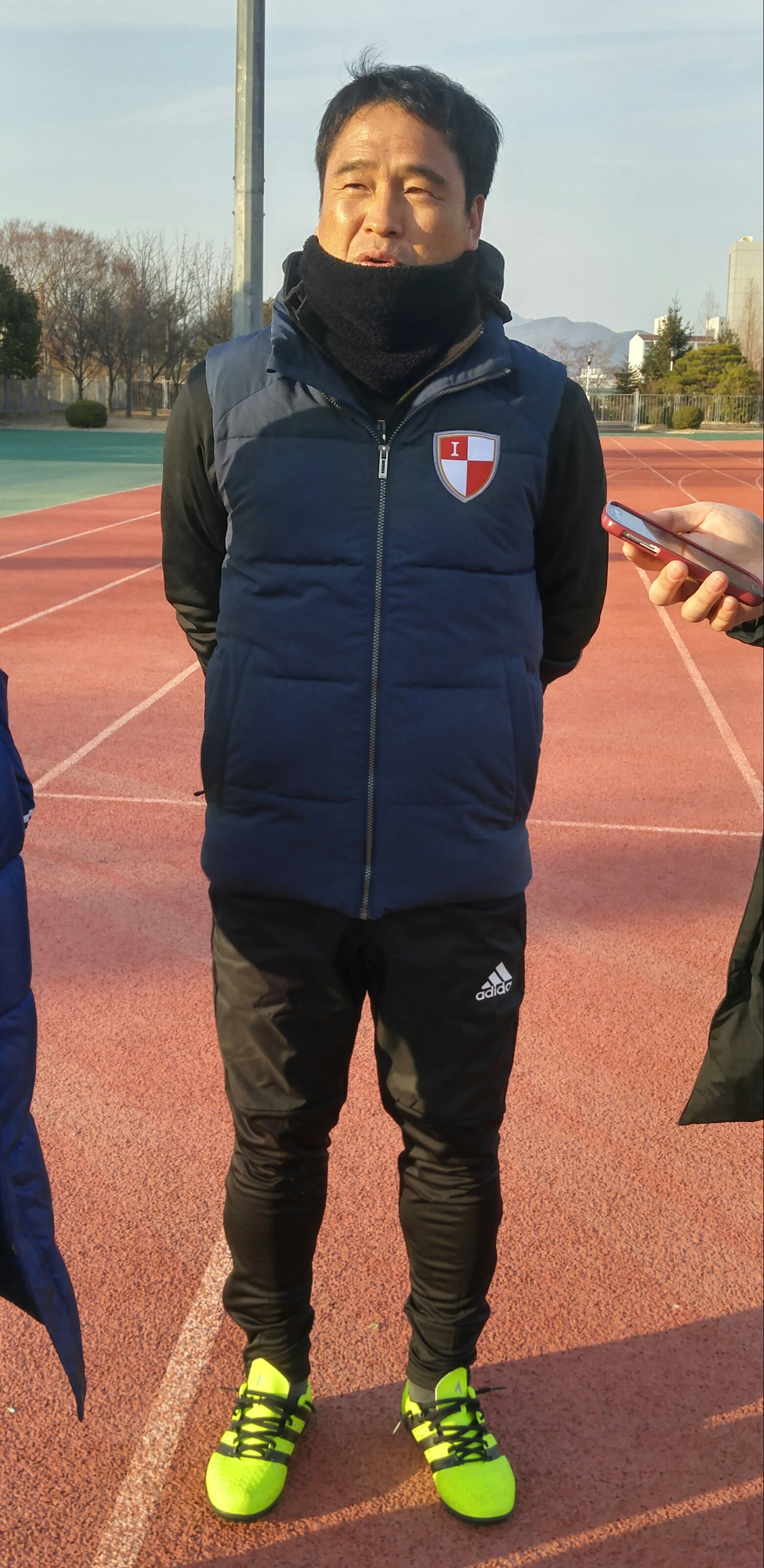 부산아이파크의 조진호 감독